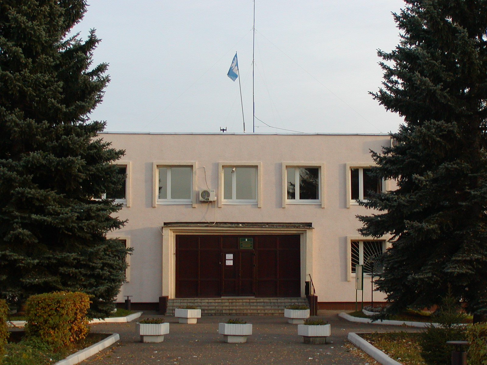 Здание администрации сельского поселения Внуковское.Unknown the building of vnukovsckoe rural settlement's administration.